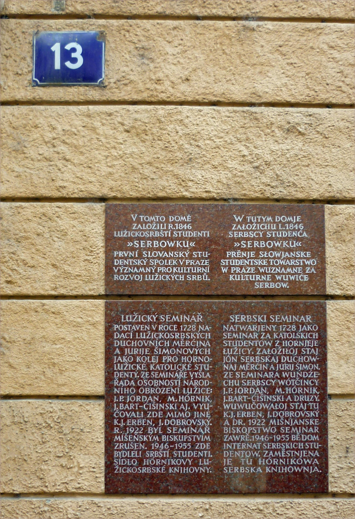 Tafel am Wendischen Seminar in Prag (U Lužického semináře 13)